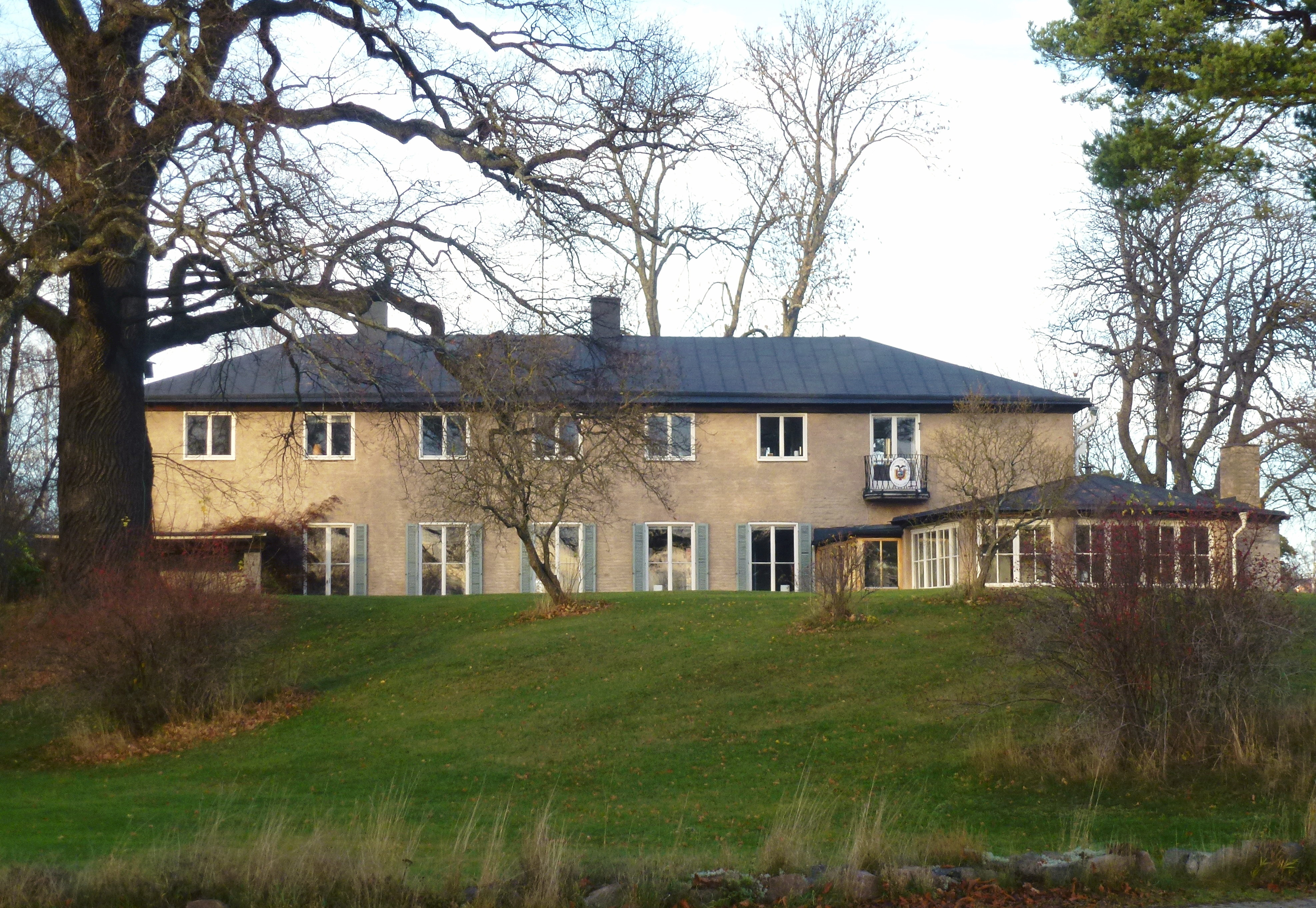 "Villa Wehtje", Ecuadors ambassad i Stockholm, ambassadörens residens, arkitekt Nils Tesch